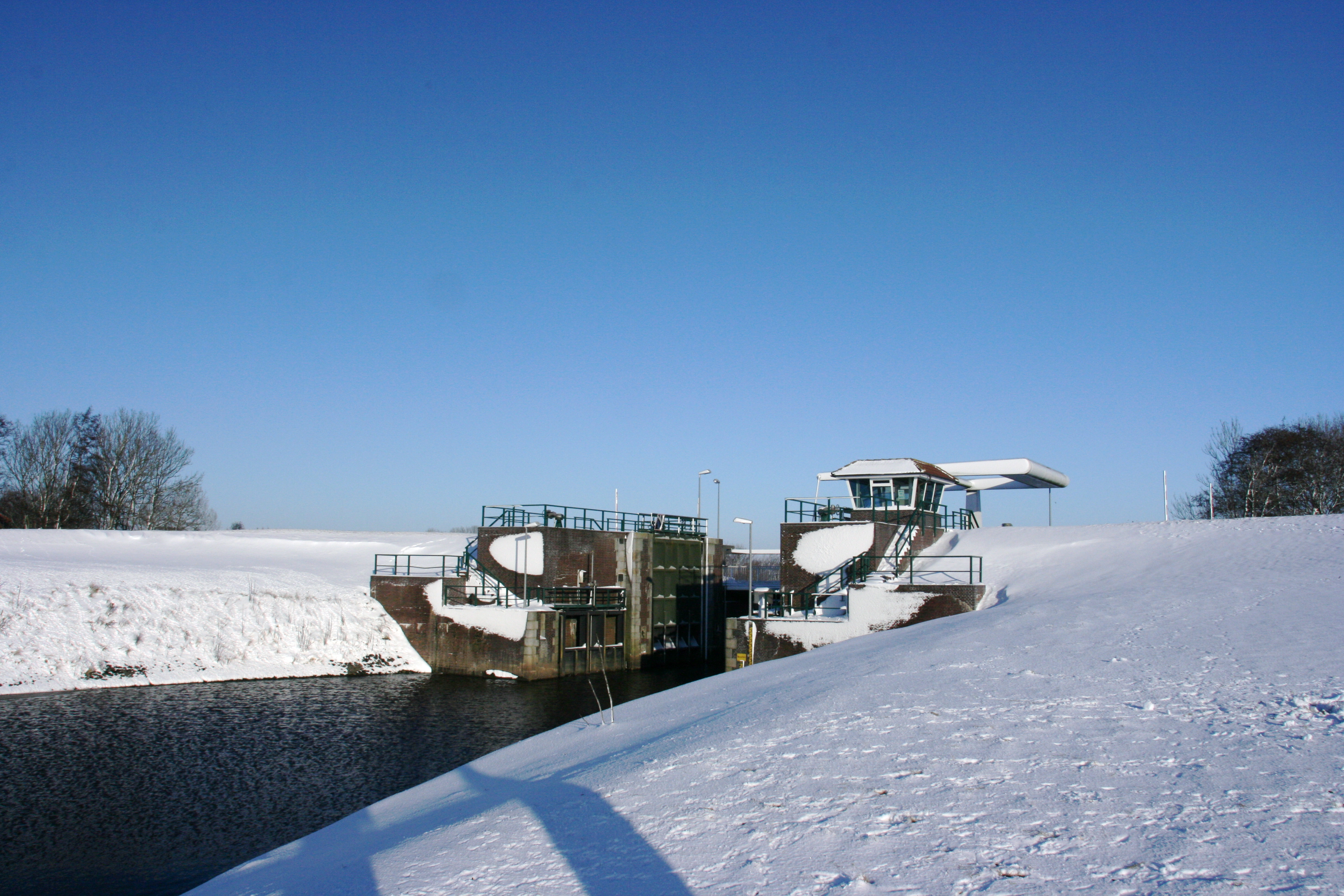 Das Leybuchtsiel